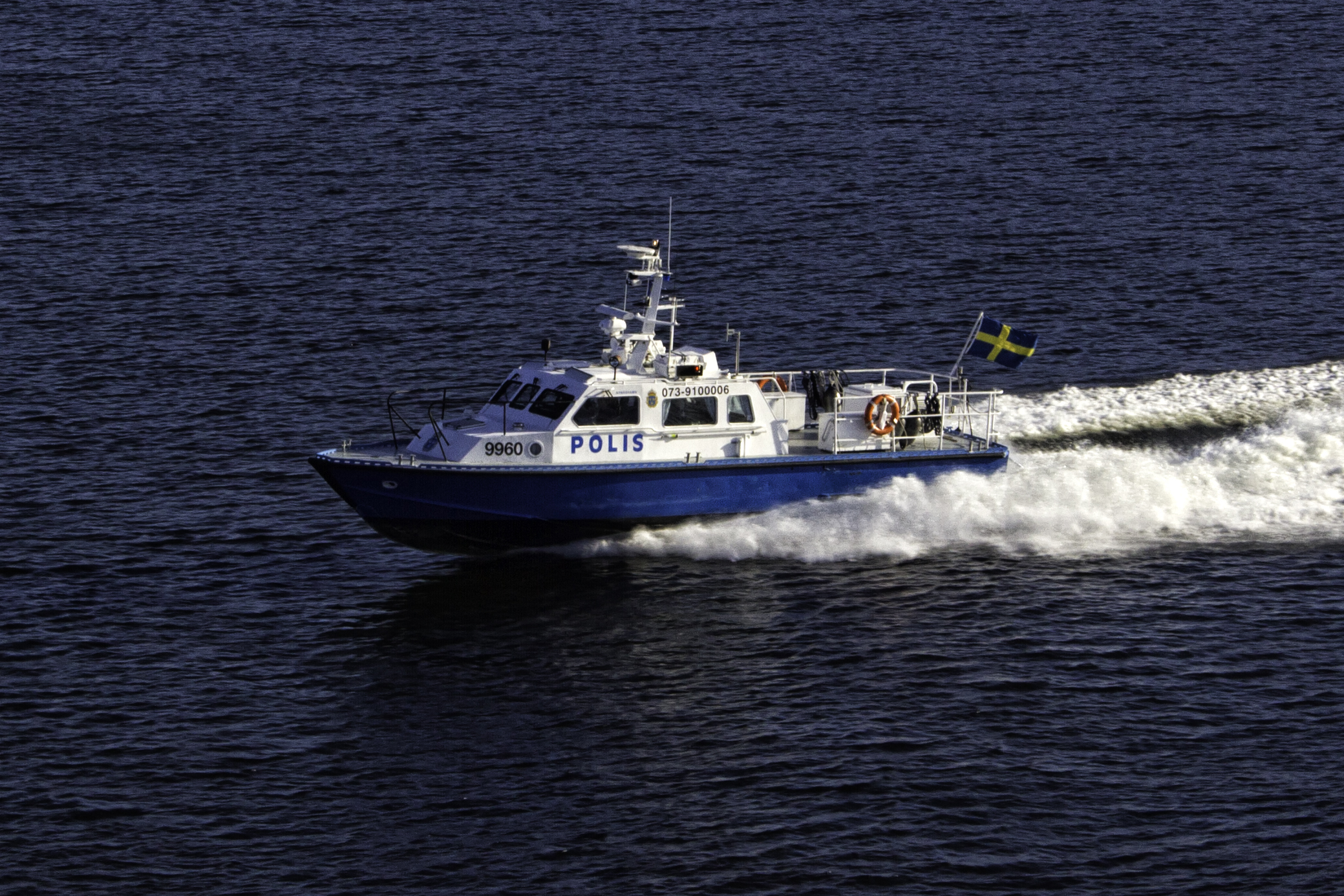 Barco da policía 9960 de Suecia na entrada de Estocolmo.